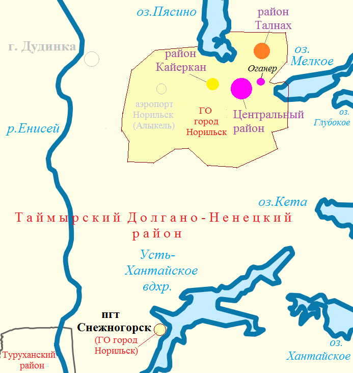 Территориальное деление Норильска: районы Норильска (Центральный, Талнах, Кайеркан) и подчинённый Норильску пгт Снежногорск, которые образуют городской округ города Норильска